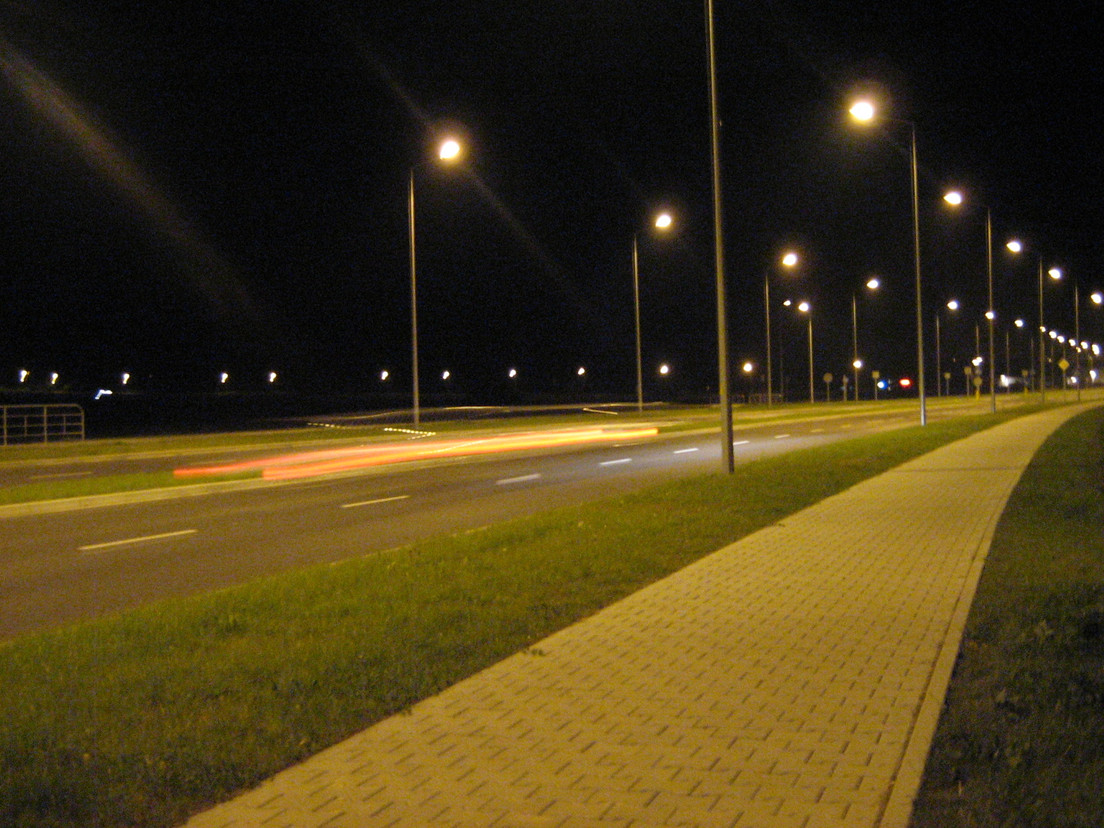 DW384 - Bielawa Beltway